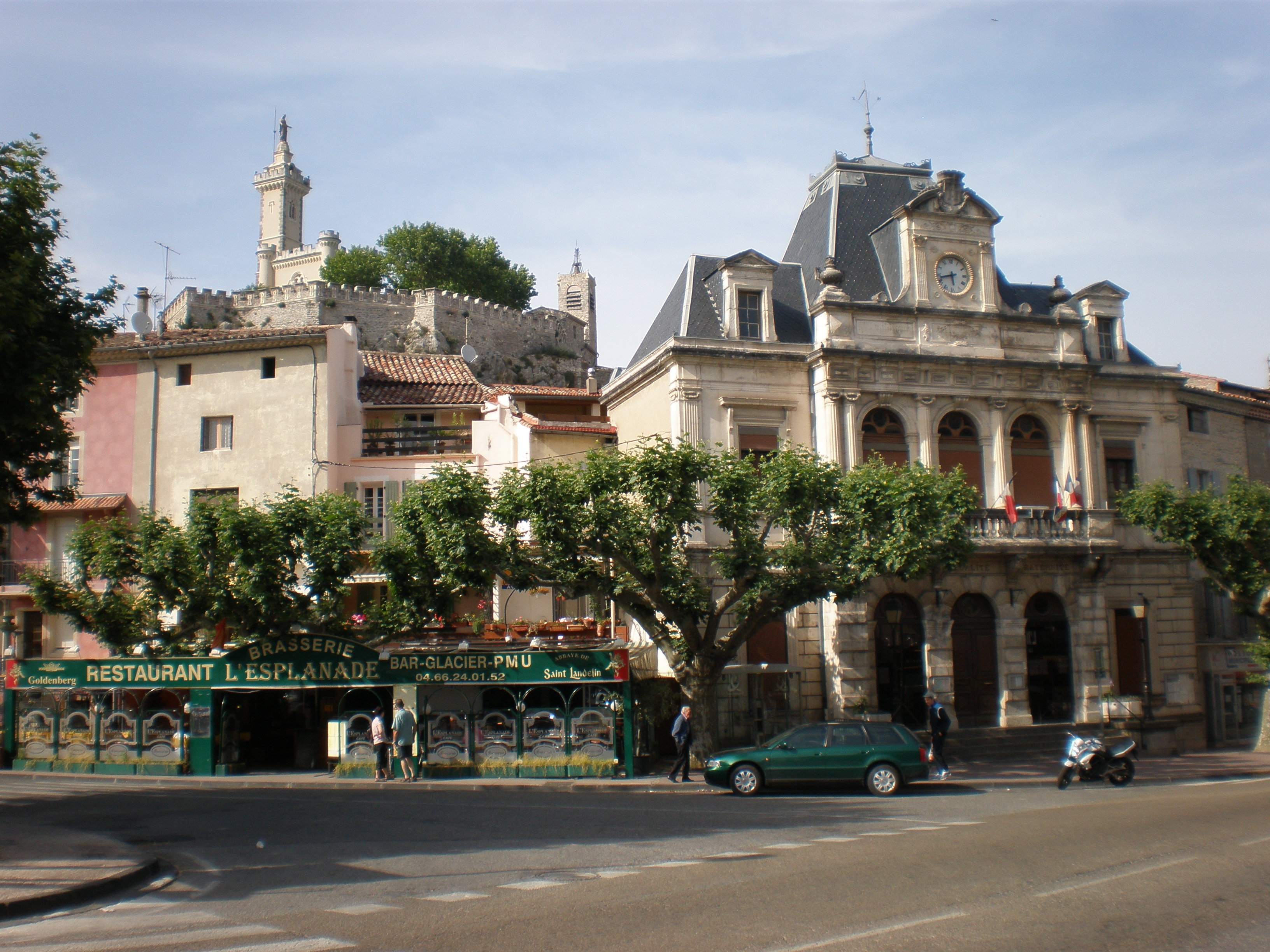 La mairie de Saint-Ambroix dans le Gard